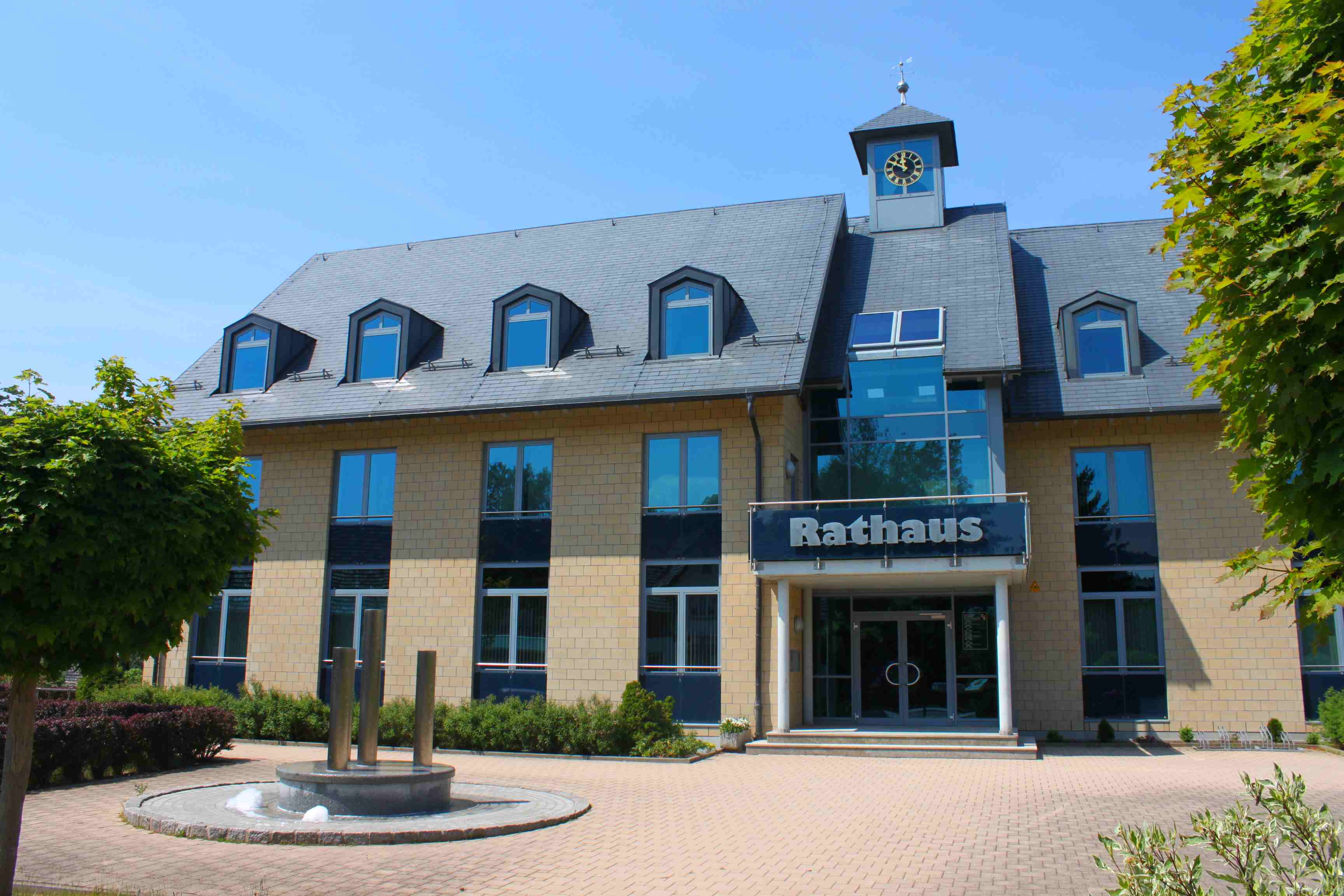 Das Rathaus in Neuhaus-Schierschnitz